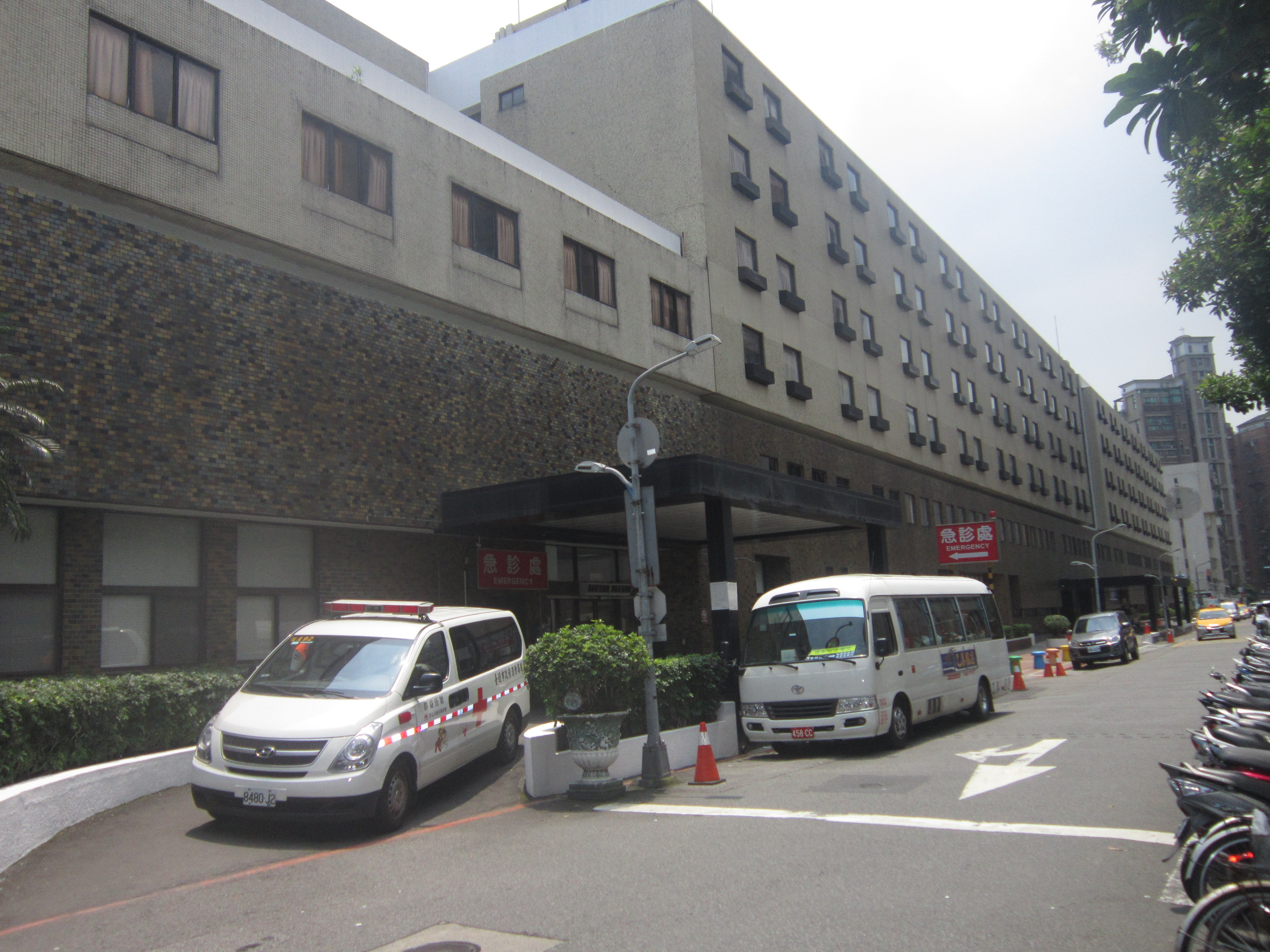 國泰綜合醫院總院本館急診處大門，前方車輛為臺北市政府消防局救護車8480-J2與國泰綜合醫院接駁車458-CC。